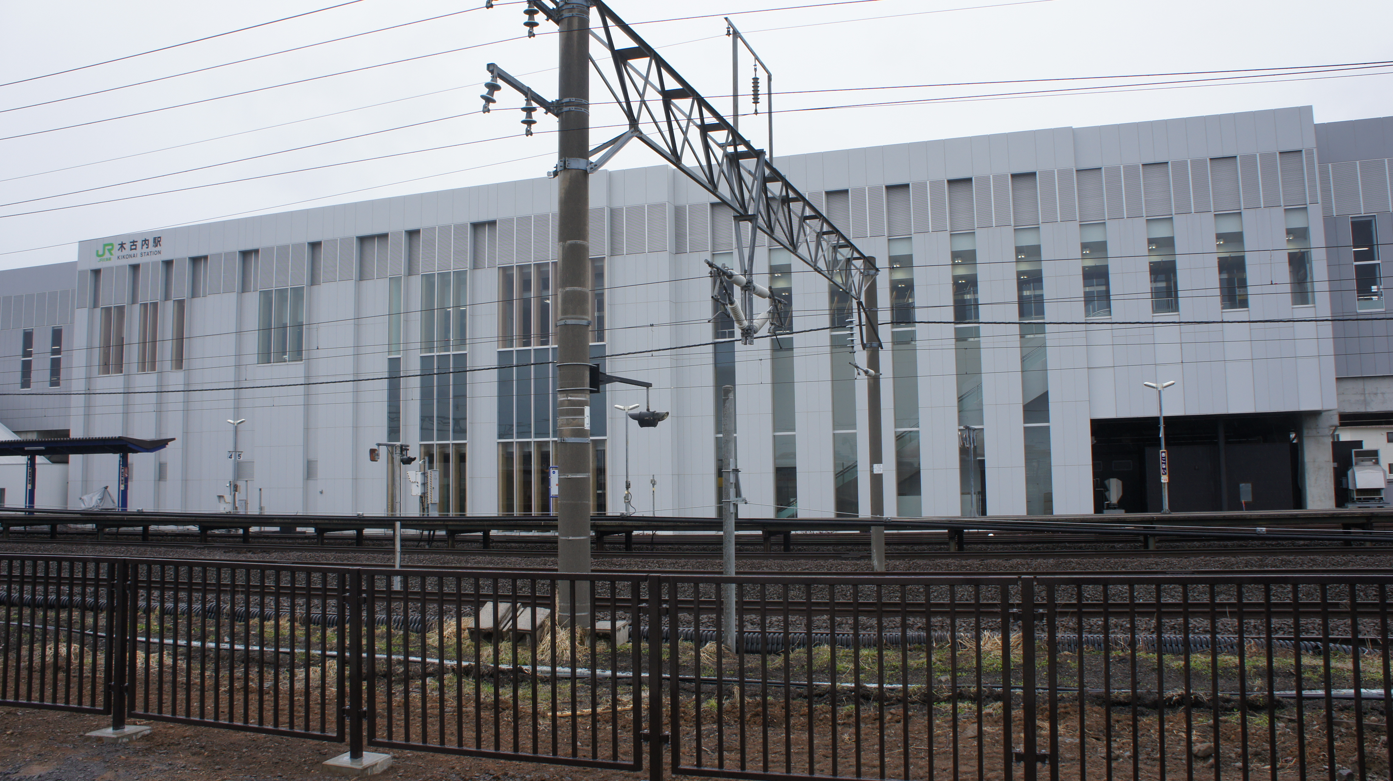 JJR北海道新幹線・木古内駅の南口駅舎